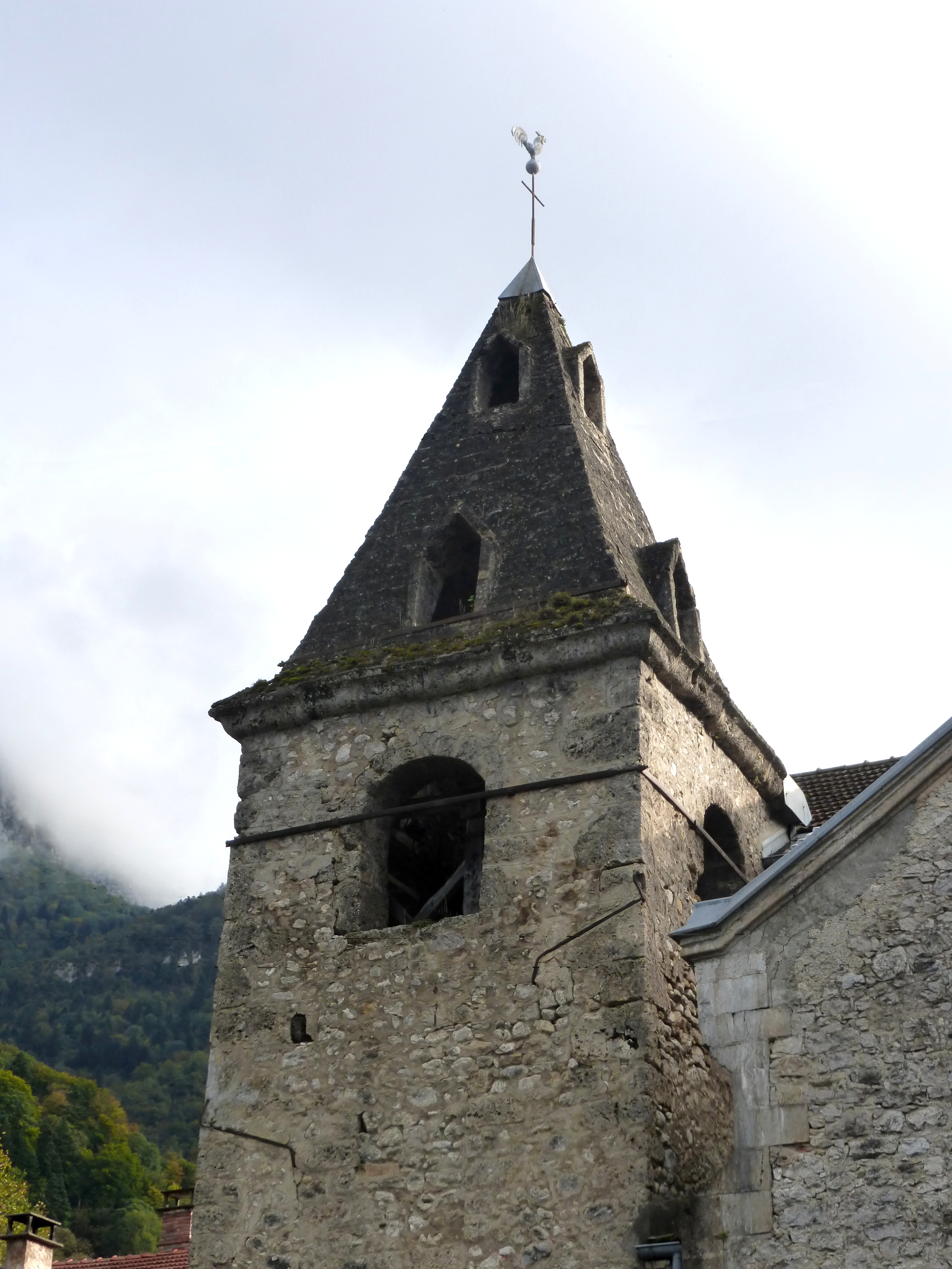 Clocher de l'église de La Rivière (Isère)